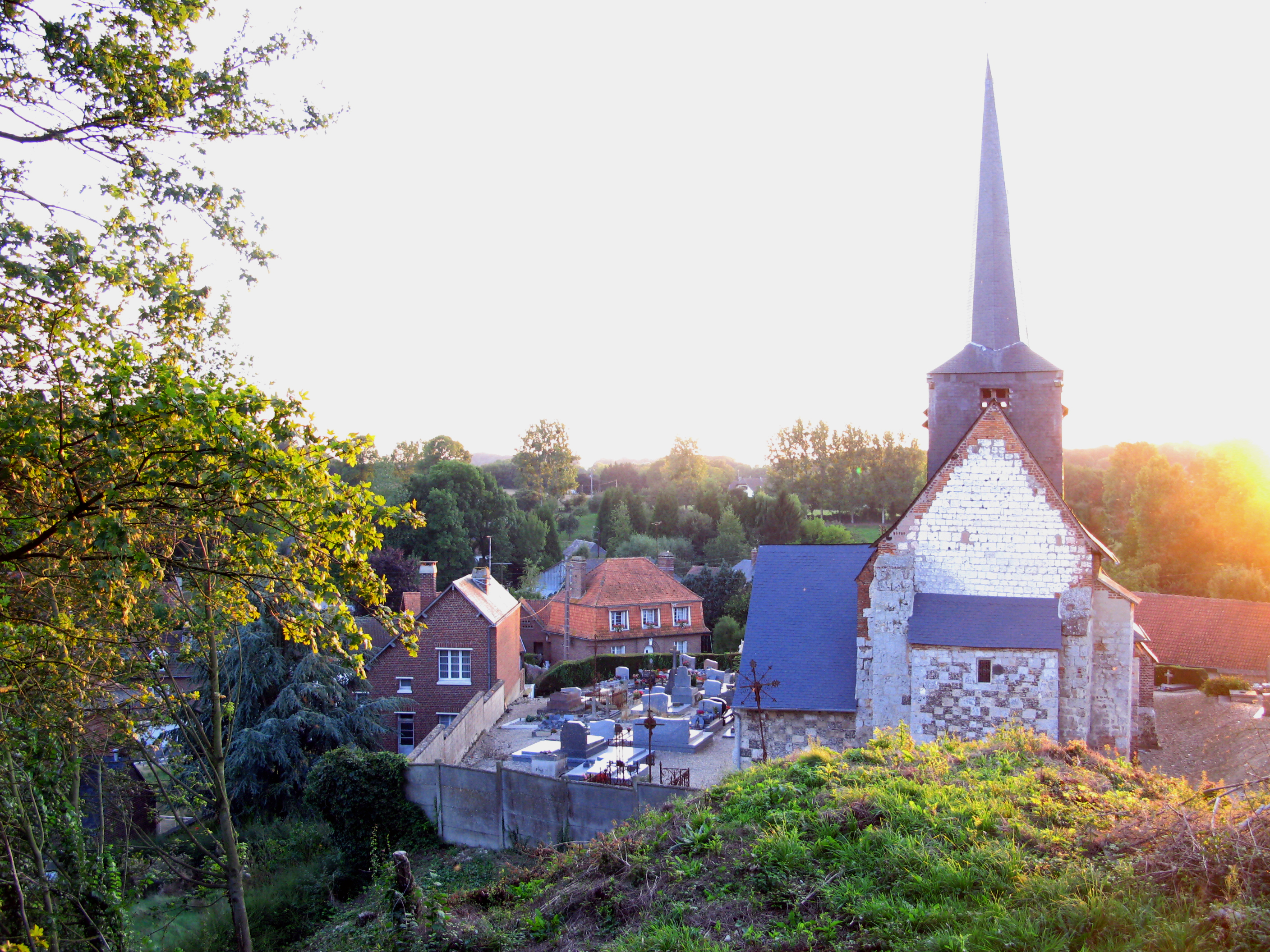 Maisnières (Somme, France) - L'église vue sous le soleil couchant depuis la motte féodale.